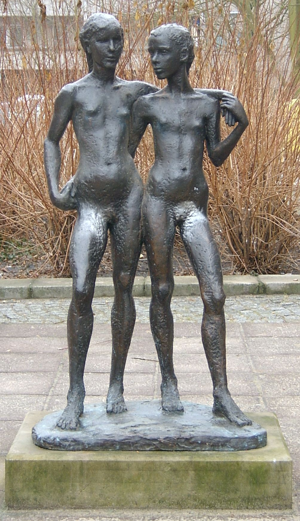 Die Bronzeplastik Geschwister der Bildhauerin und Malerin Liz Mields-Kratochwil steht in der Magistrale in Frankfurt (Oder). Dargestellt werden zwei nackte Mädchen. Die Modelle für die Plastik waren die Tochter der Bildhauerin Anne-Kathrin, die etwas größere, und deren Freundin Friederike. Die Plastik wurde um 1987 erstellt und etwa drei Jahre später aufgestellt.